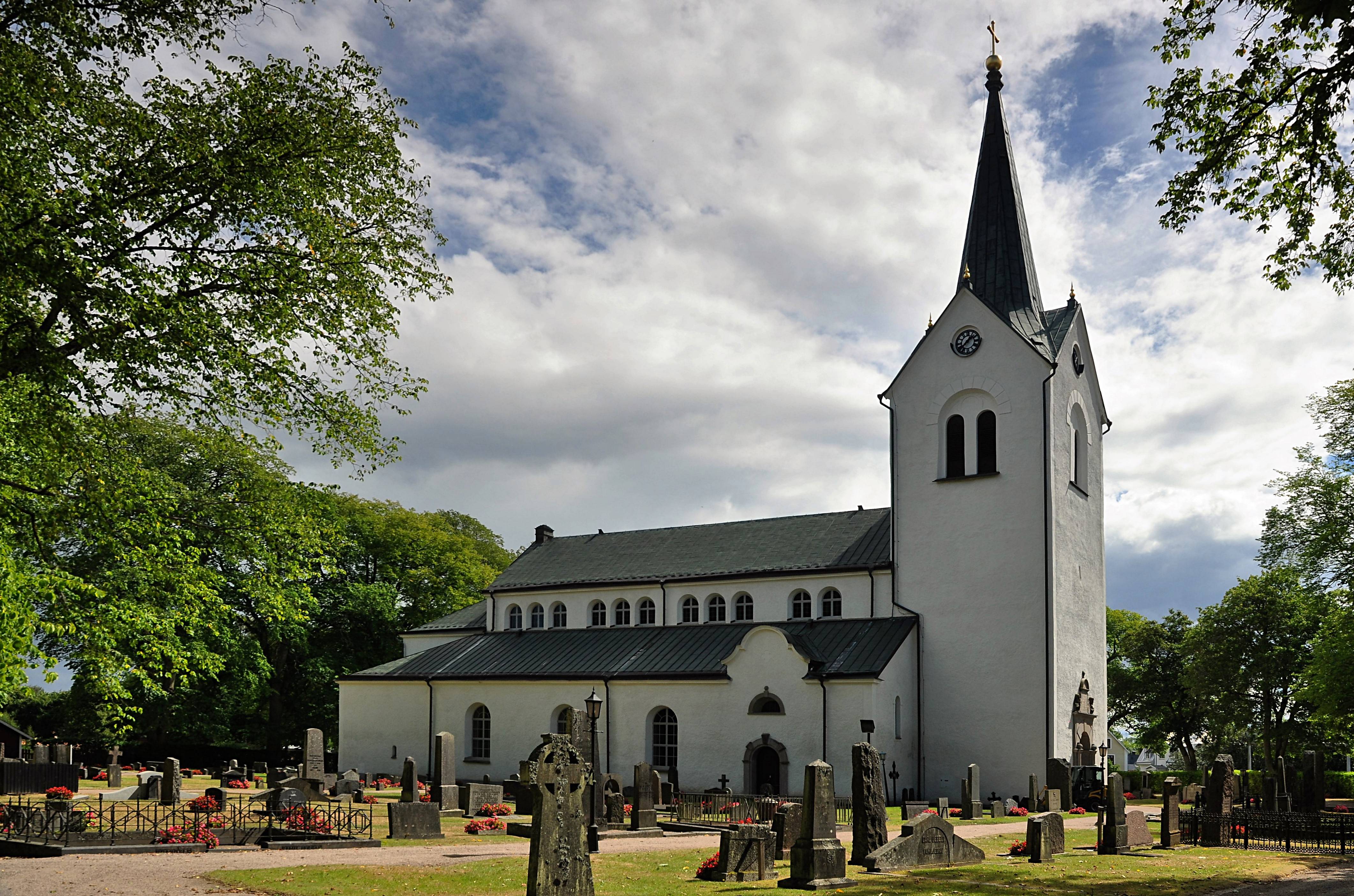 Vetlanda kyrka (Tjustkulle 1:3)